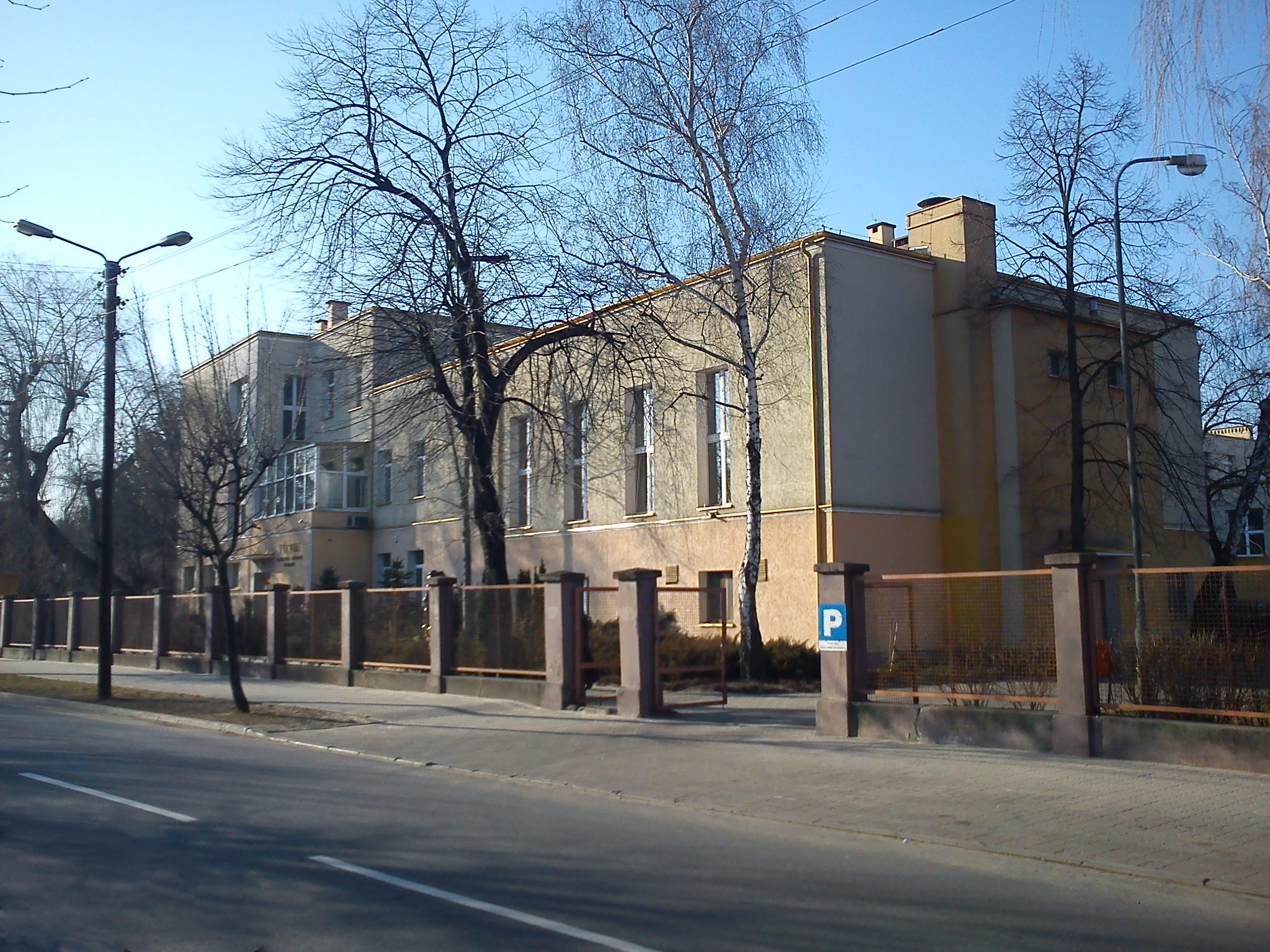 Widok z ulicy Adama Mickiewicza na I Liceum im. Tadeusza Kościuszki w Koninie.